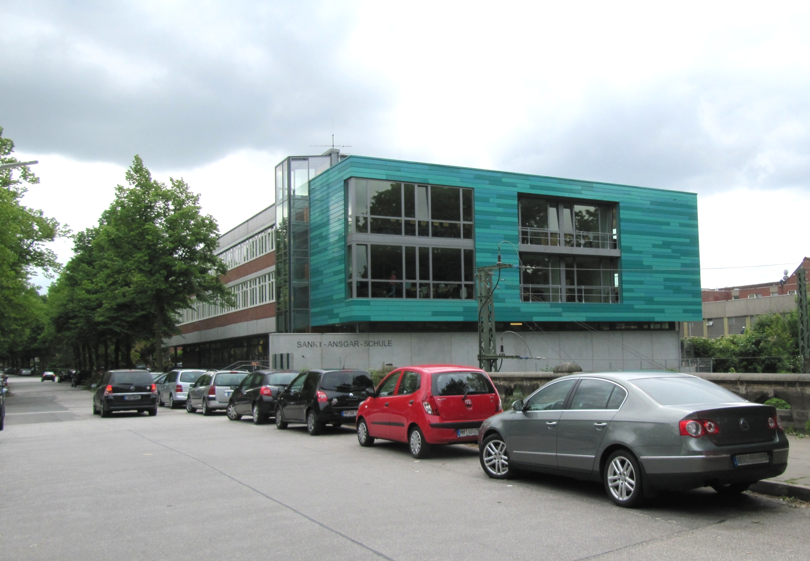 Anbau am Neubau der SAS (2010 erstellt), von Norden aus gesehen